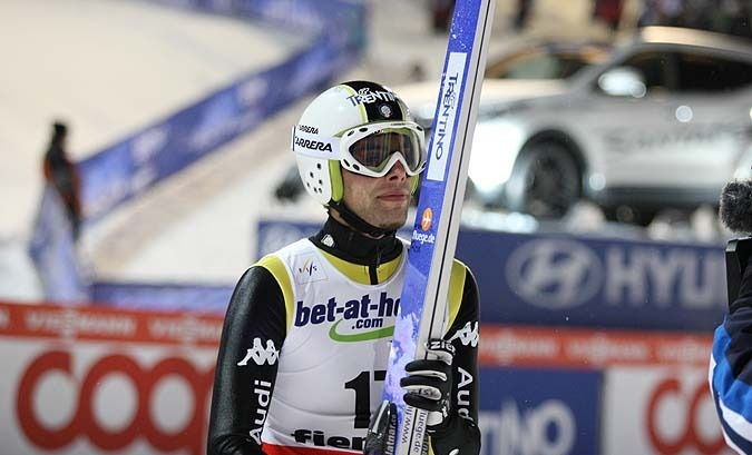 Roberto Dellasega podczas serii kwalifikacyjnej do konkursu Mistrzostw Świata 2013 na skoczni normalnej